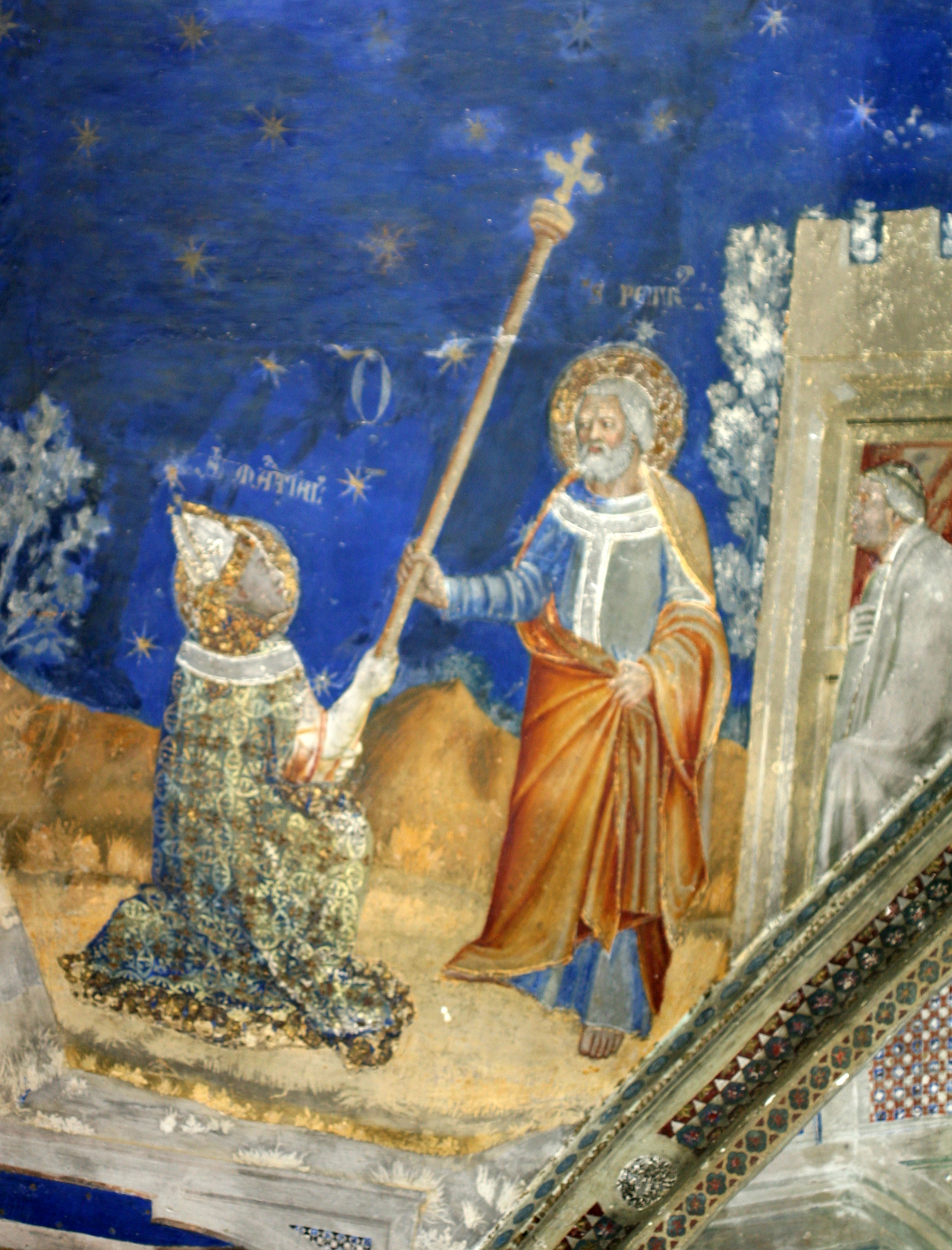 La vie de saint Martial - Remise du bâton de saint Pierre (détail) - Voûtain est. Chapelle de saint Martial, Palais des Papes, Avignon, Vaucluse, France.